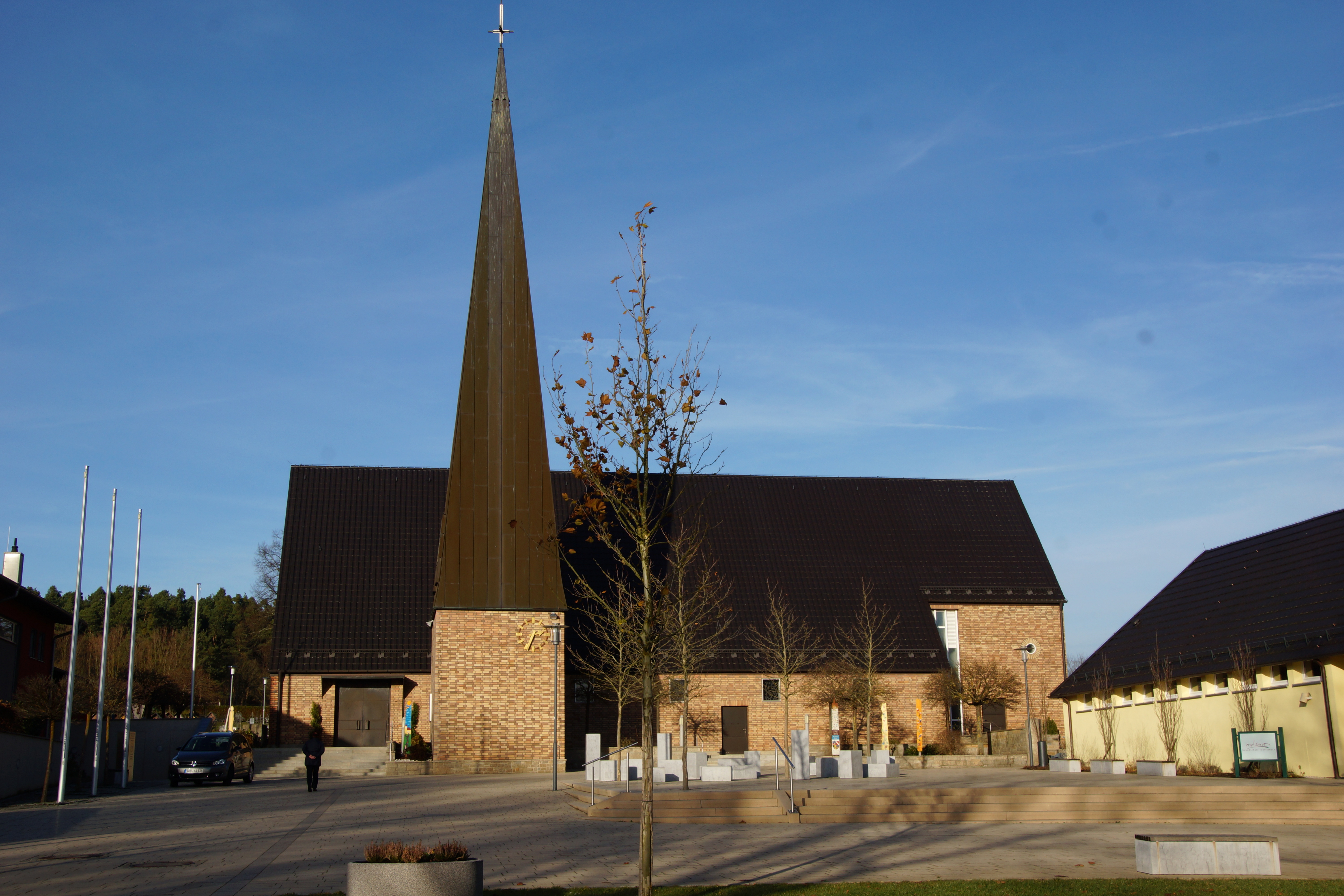 Die katholische Pfarrirche St. Albertus Magnus in Dürnsricht, Gemeinde Fensterbach